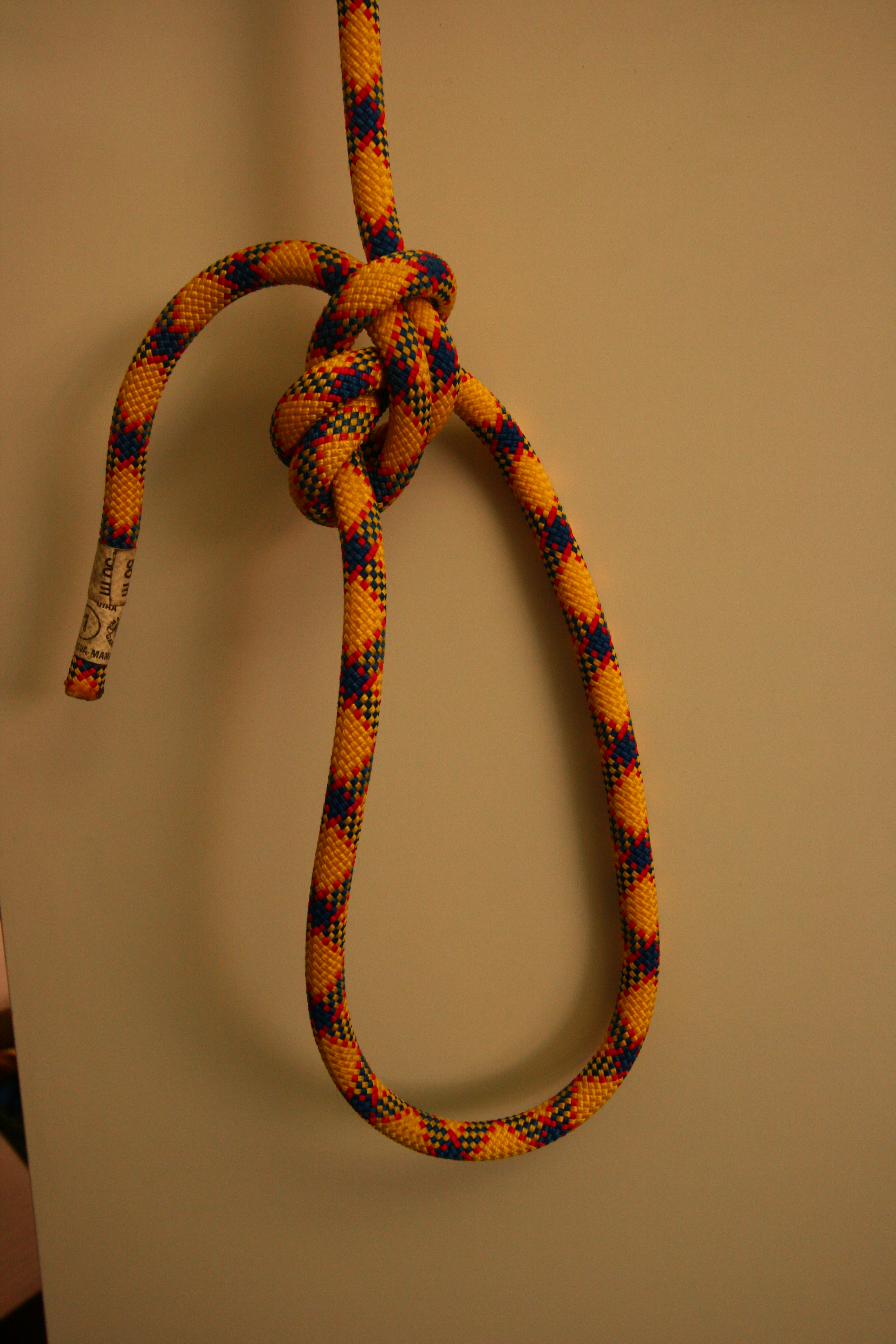 Anseilknoten beim Klettern (s. auch: Bulin1.5a.jpg)